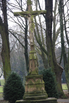 Hochkreuz auf dem ehem. kath. Friedhof in Düren, heute Konrad-Adenauer-Park, in der Kölnstraße